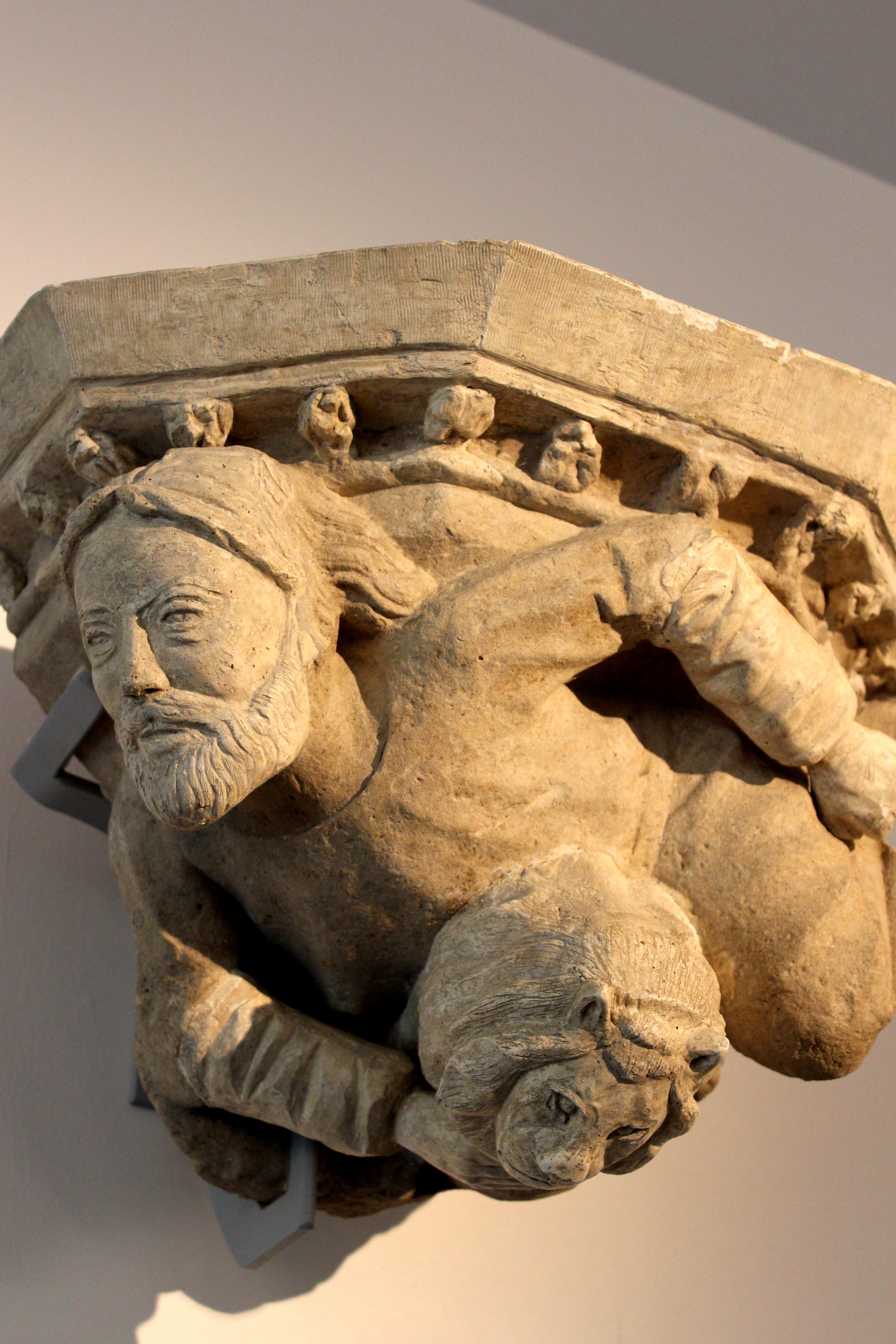 Abdijmuseum Ten Duinen, Koksijde, België. Kraagsteen met afbeelding van man en leeuw (14de eeuw)